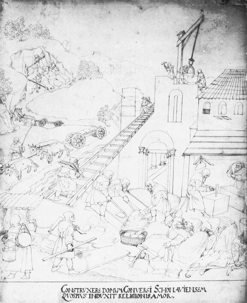 Kloster Schönau (Graphische Sammlung Germanisches Nationalmuseum)